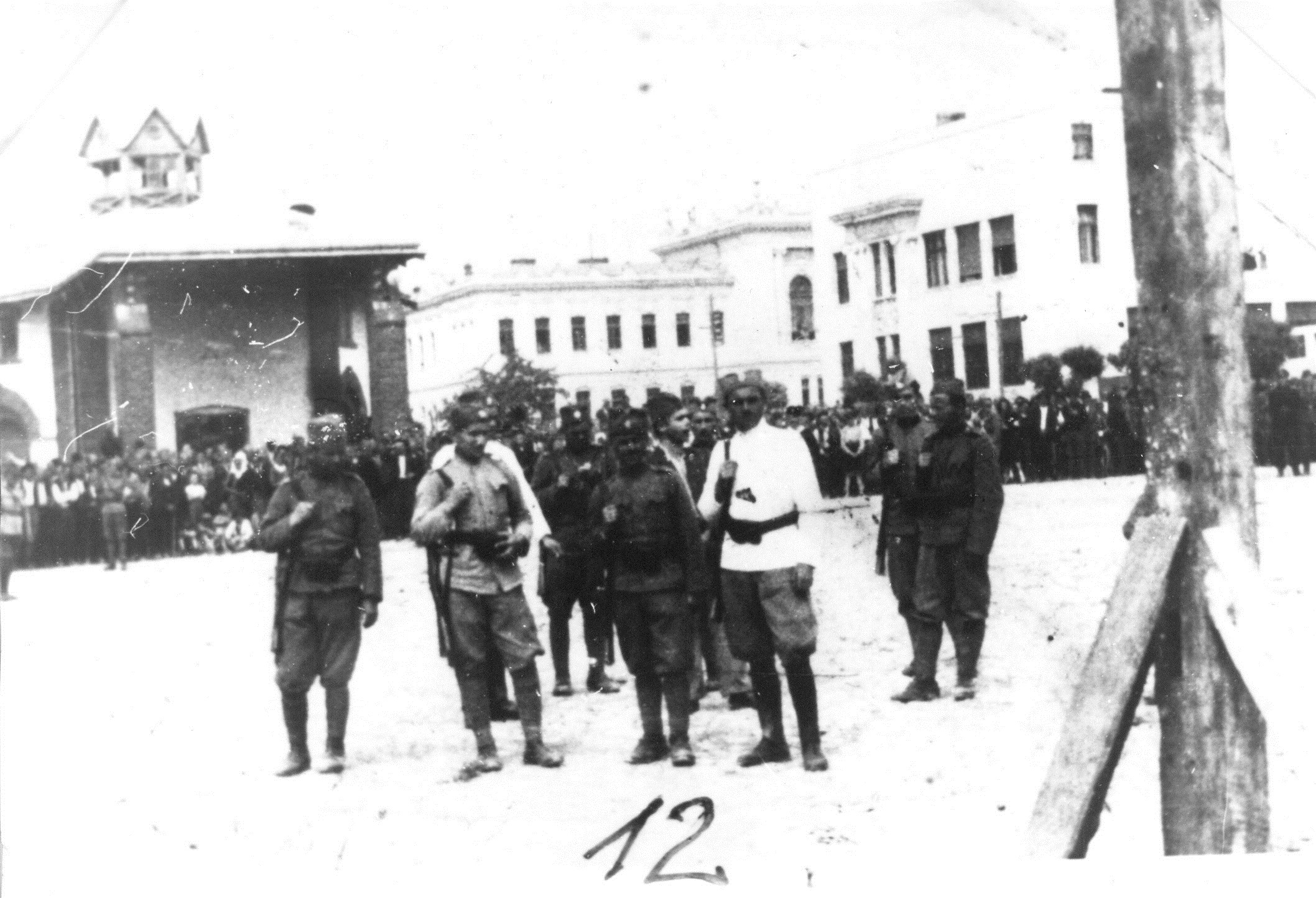 Izvođenje na javno vešanje narodnog heroja Stejpana Steve Filipovića 22. maja 1942. godine